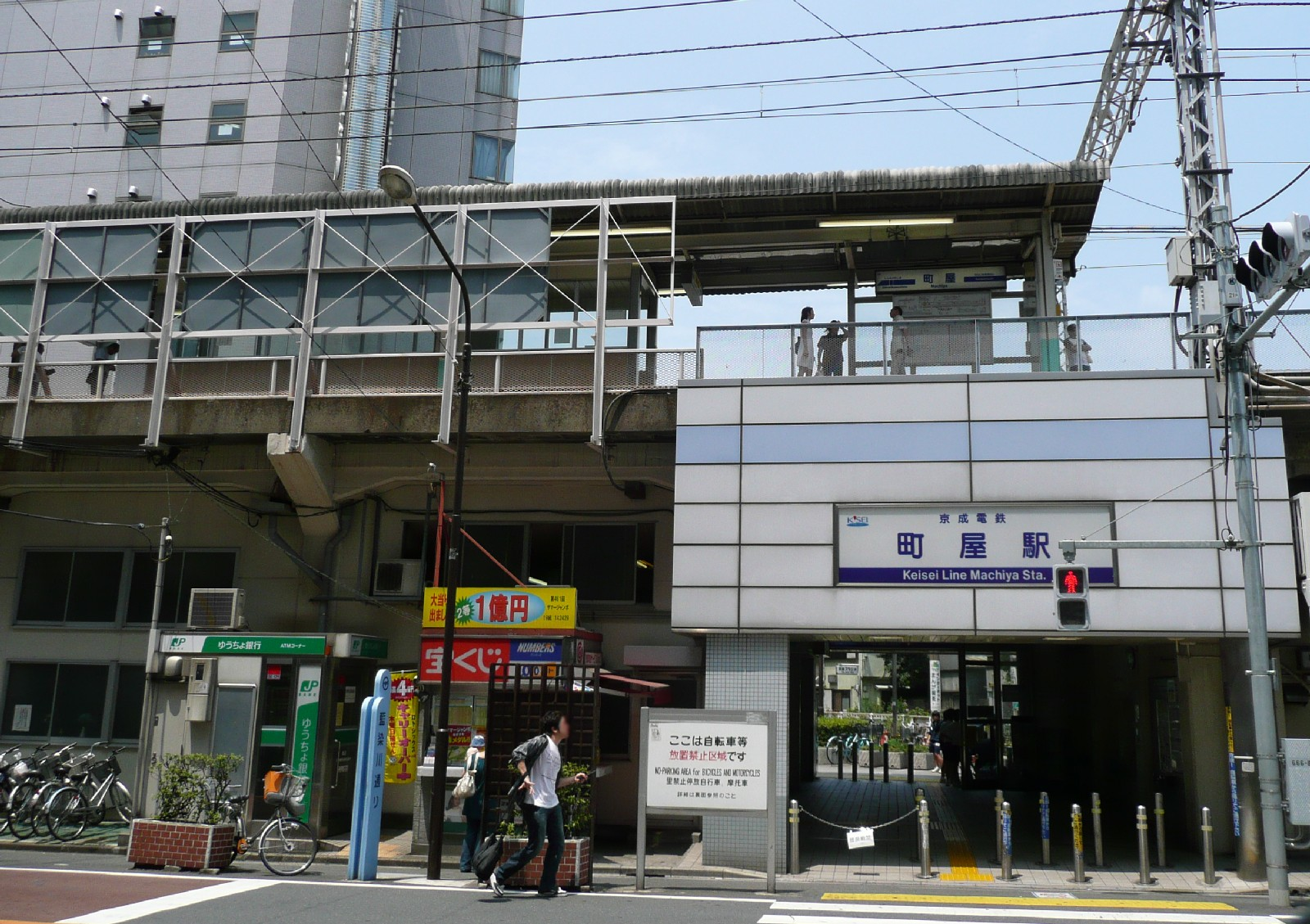 京成電鉄町屋駅